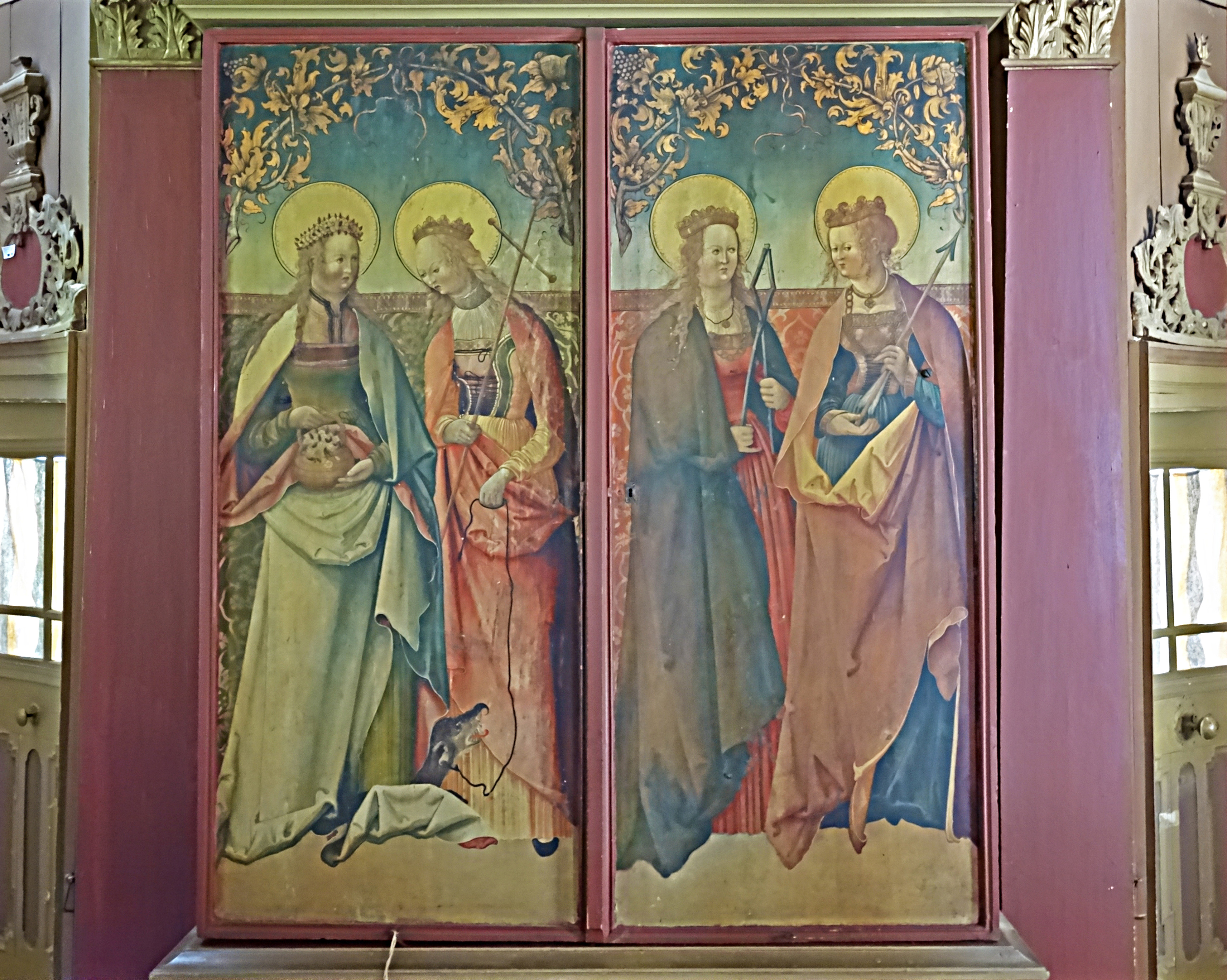 Flügelaltar von 1525 in der Dorfkirche St. Laurentius (Gräfenroda). Die Werktagsseite zeigt links die Heiligen Dorothea und Margareta, rechts Apollonia und Ursula.